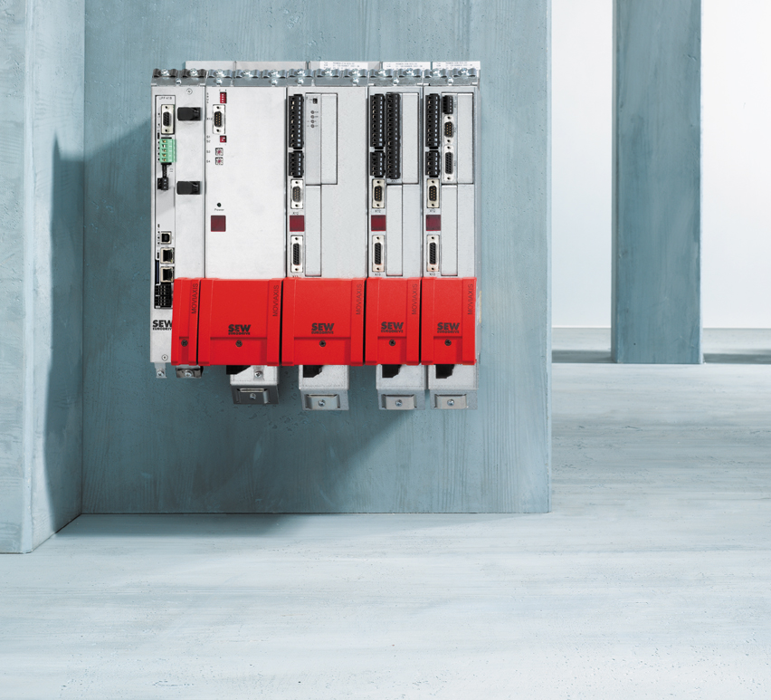 Beispiel eines Servoverstärkers